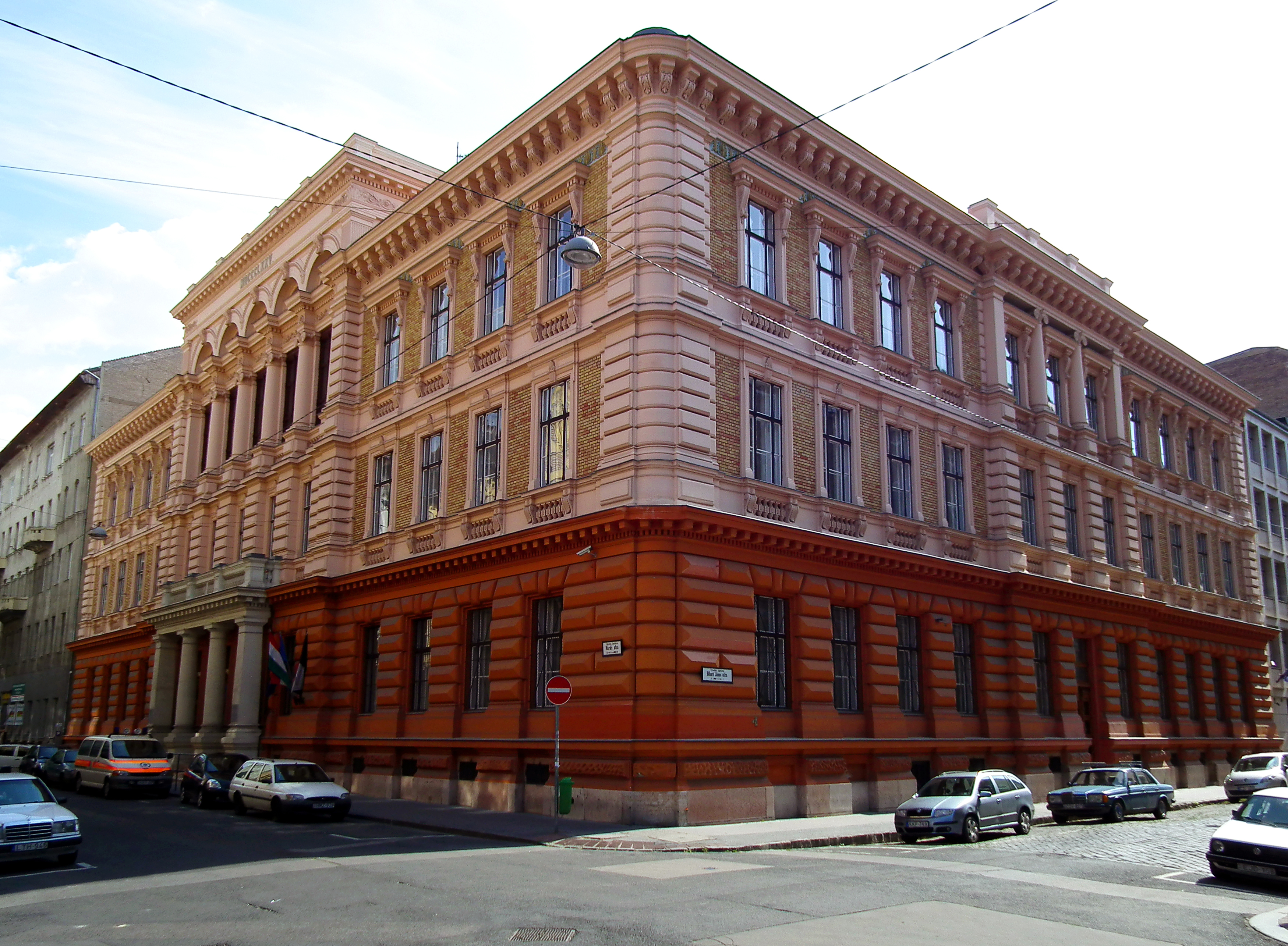 Az egykori V. kerületi állami királyi főgimnázium, ma BGF This is a photo of a monument in Hungary. Identifier: 527